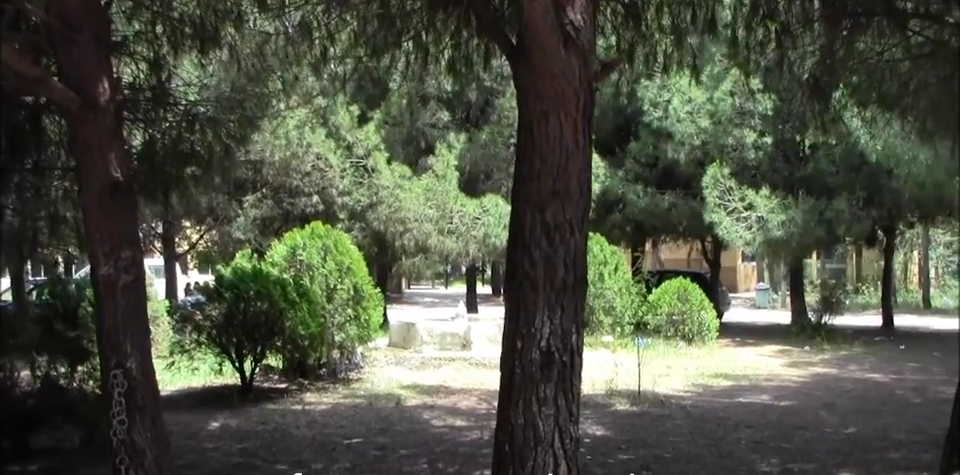 la verdure à l'enst